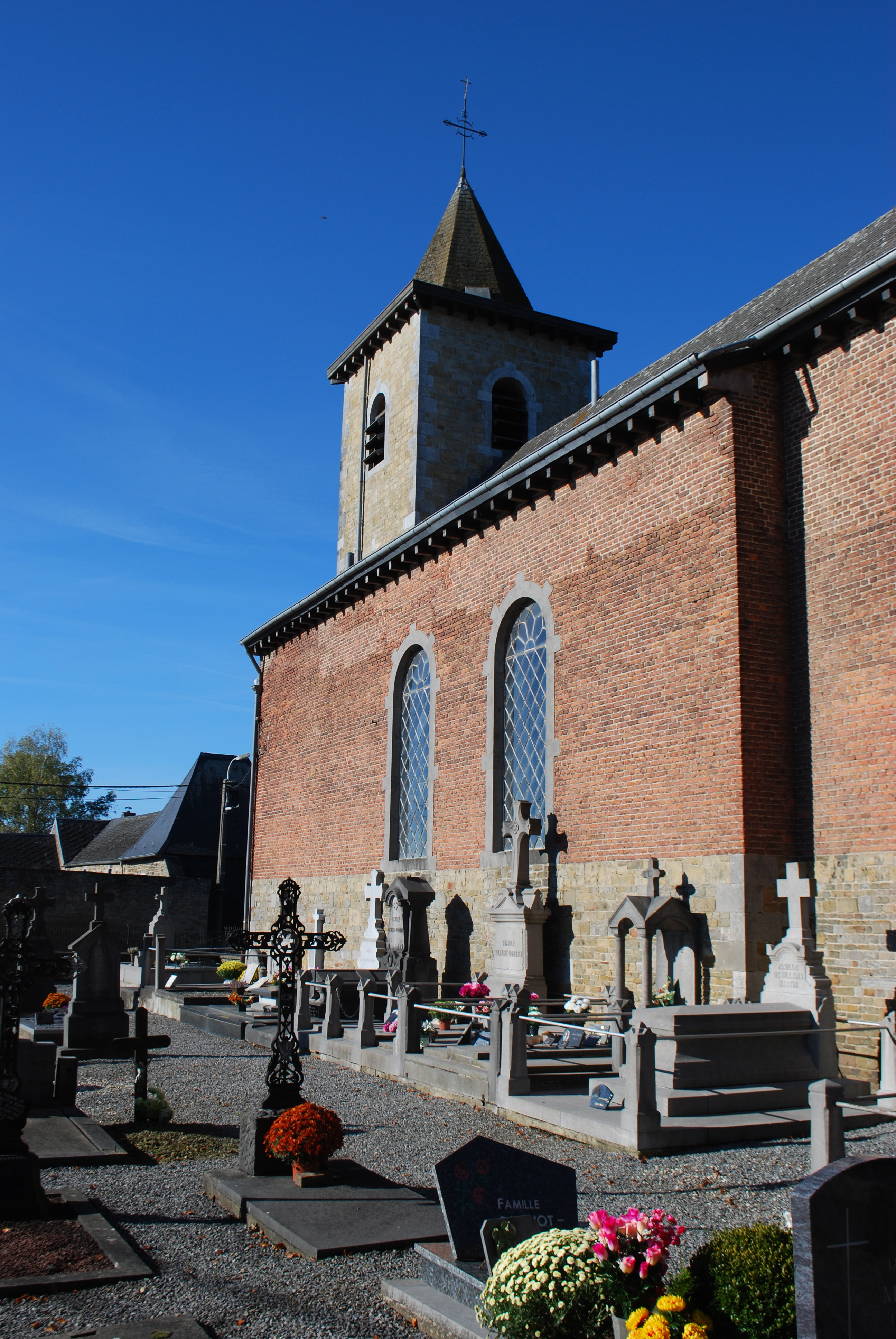 Vue du village d'Ellemelle (commune d'Ouffet) dans le Condroz, en Belgique.